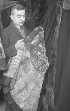 Title: Berlin, Pfandleihe, Pelzkammer Additional information